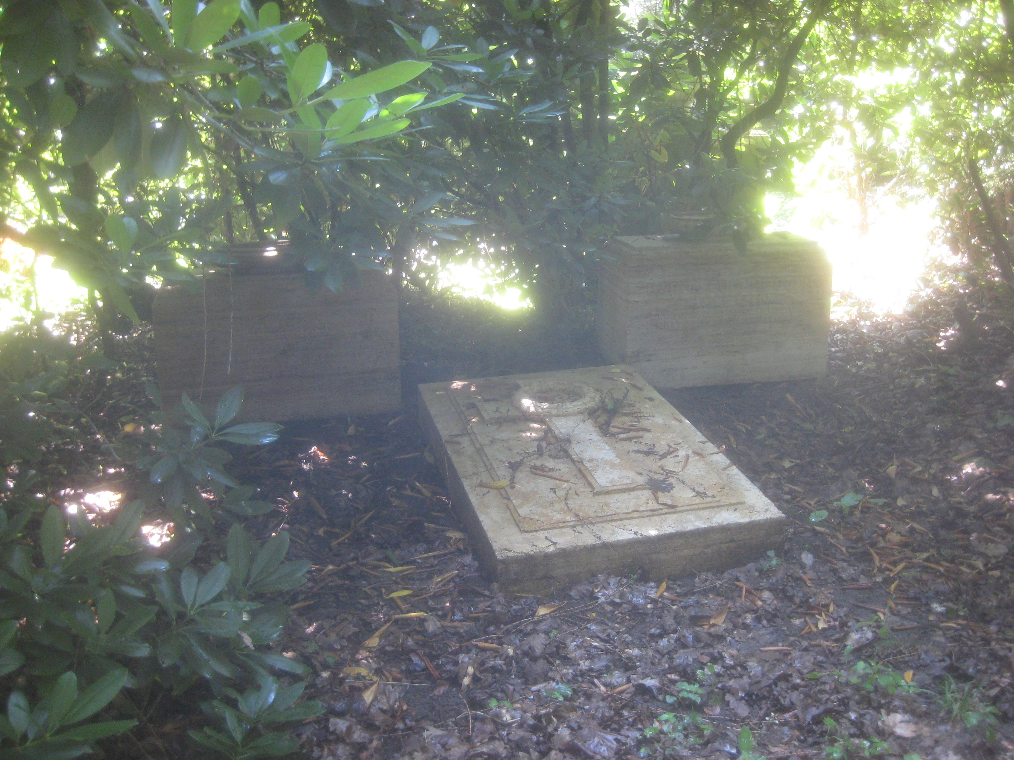 Grab von Sigrid Onégin, Stuttgart, Waldfriedhof Stuttgart, Abteilung 07 c.